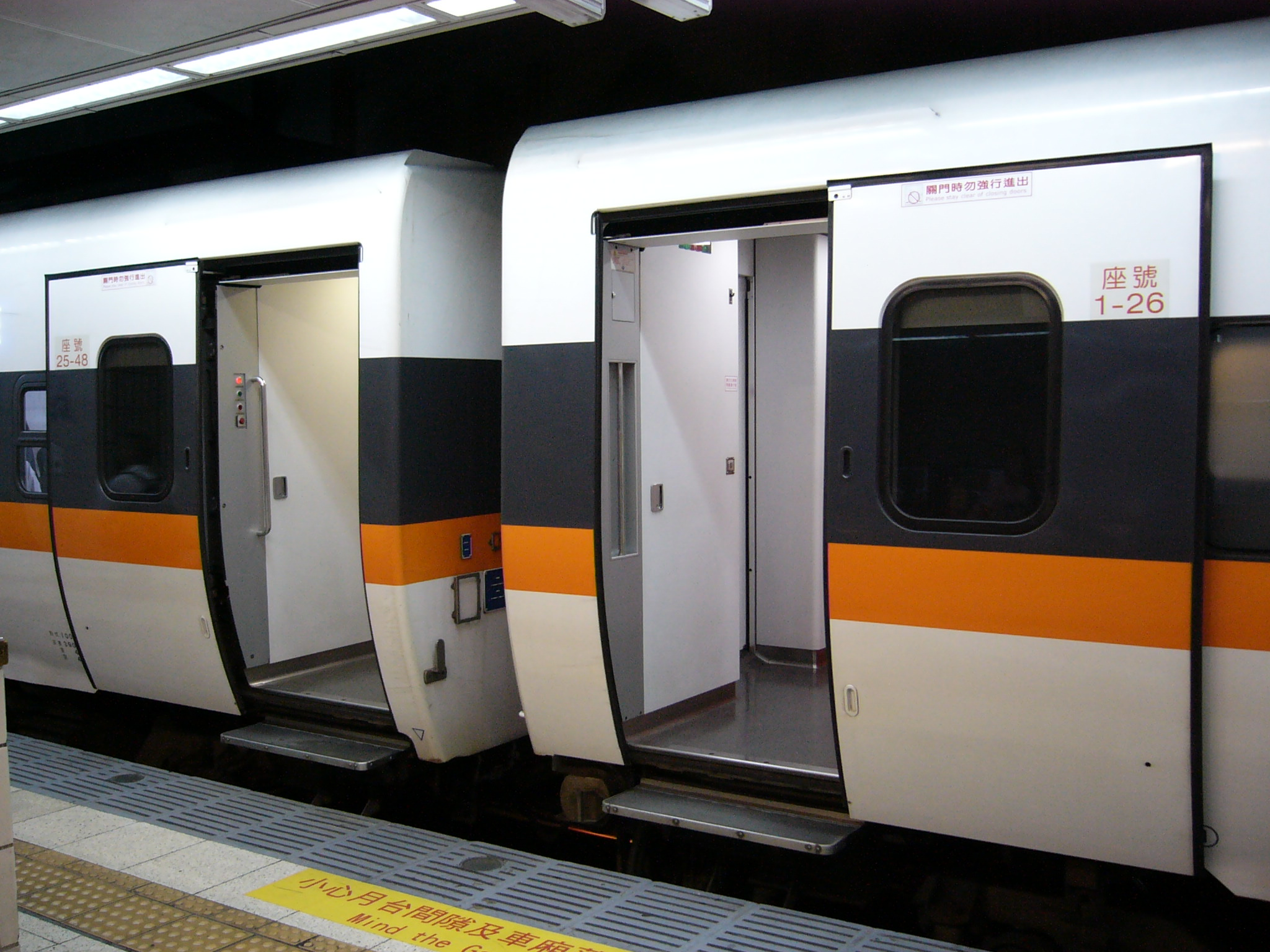 台鐵TEMU1000型電聯車自動門開啟